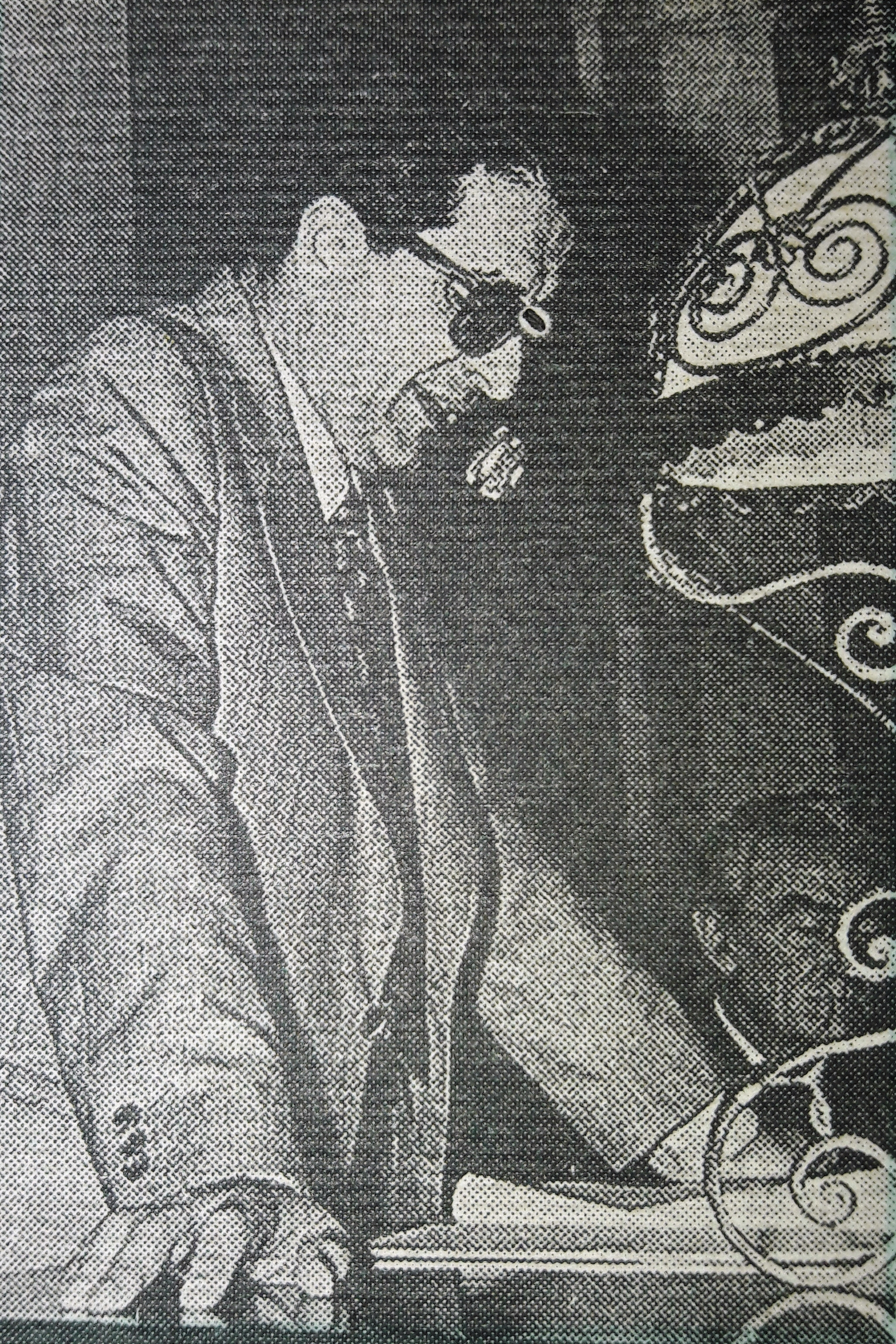 Antonio Capizzi